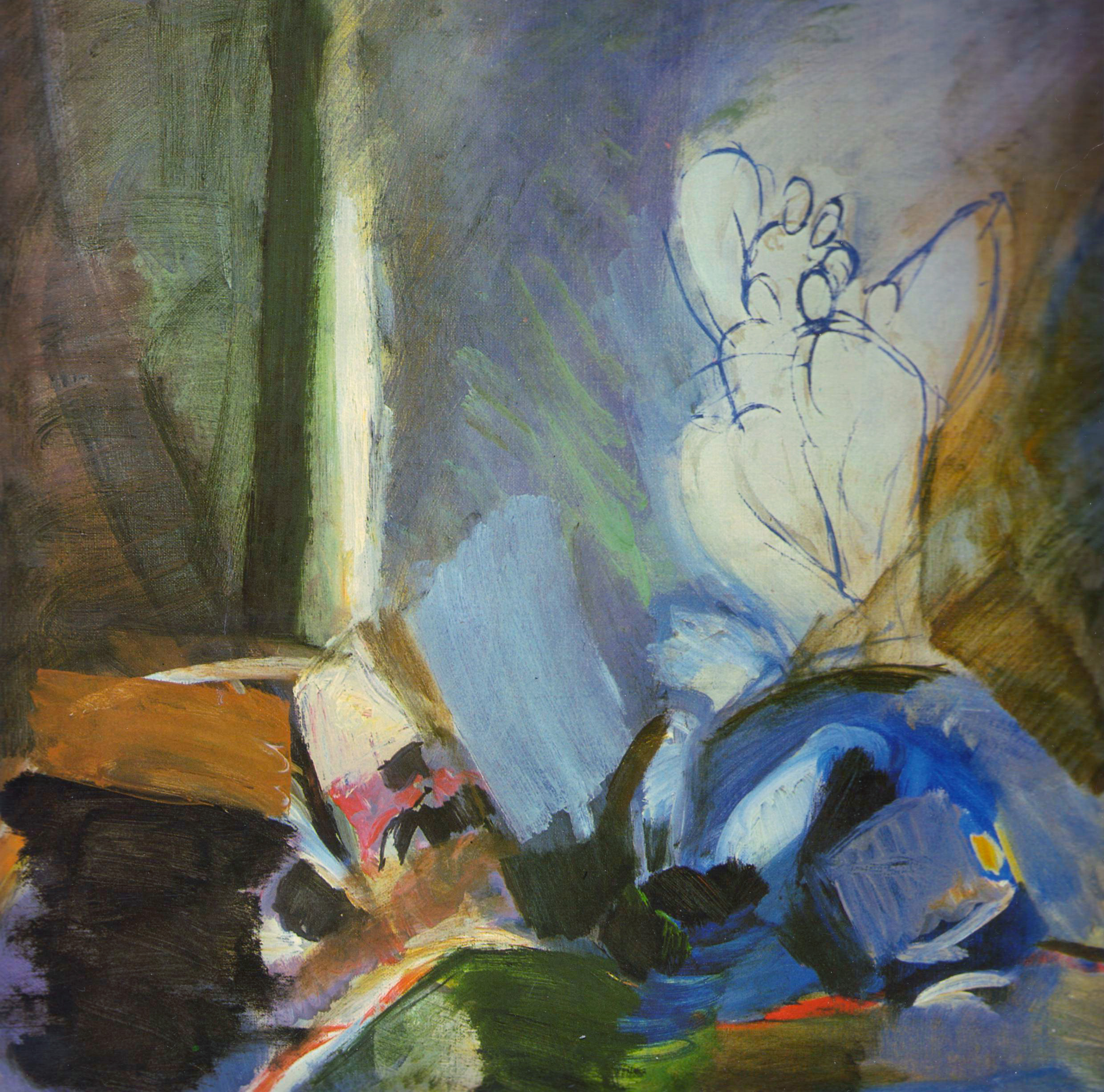 מרבד הקסמים ציור שמן מסדרת מרבד הקסמים